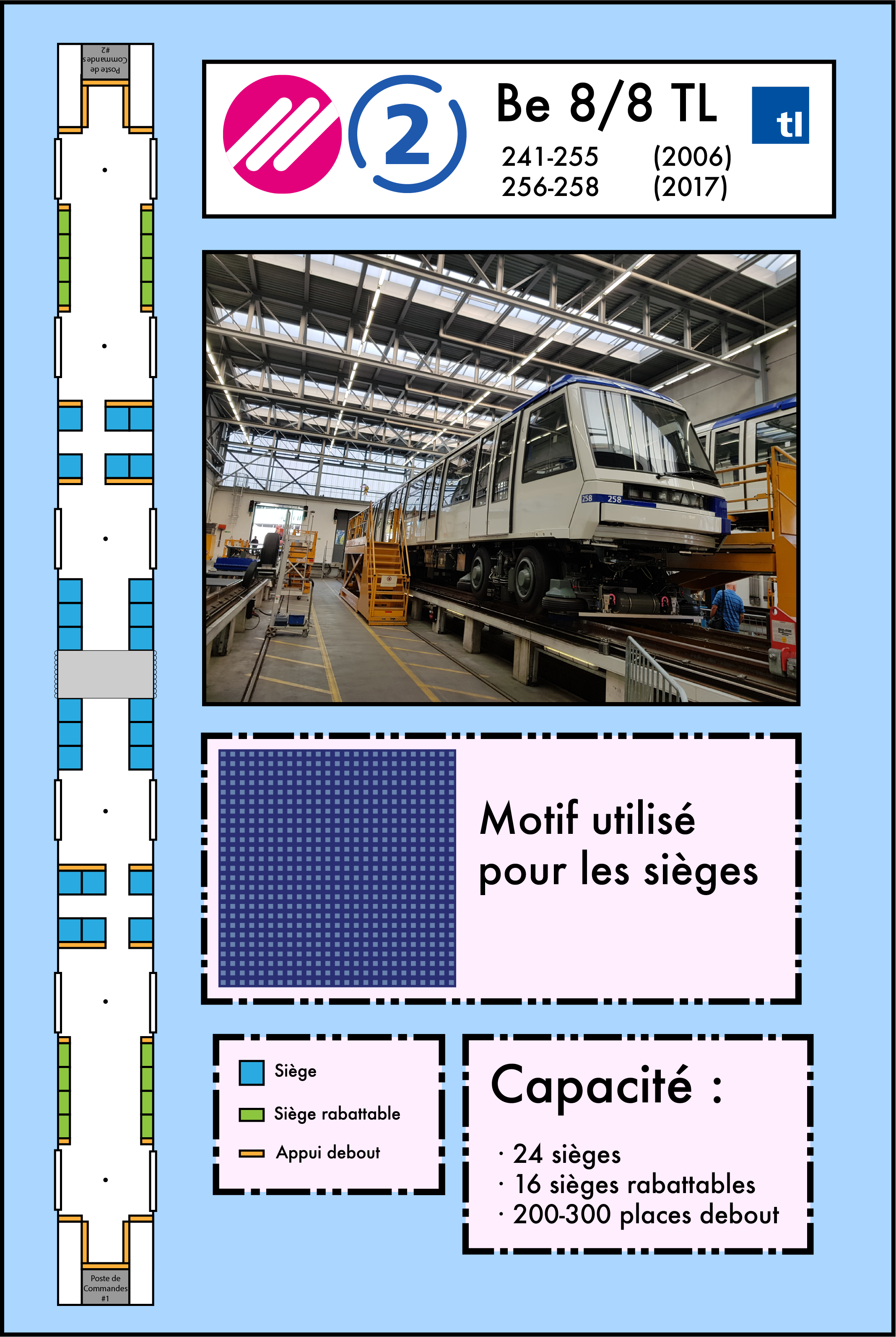 Fiche info avec un plan de l'intérieur du m2 Document non officiel.